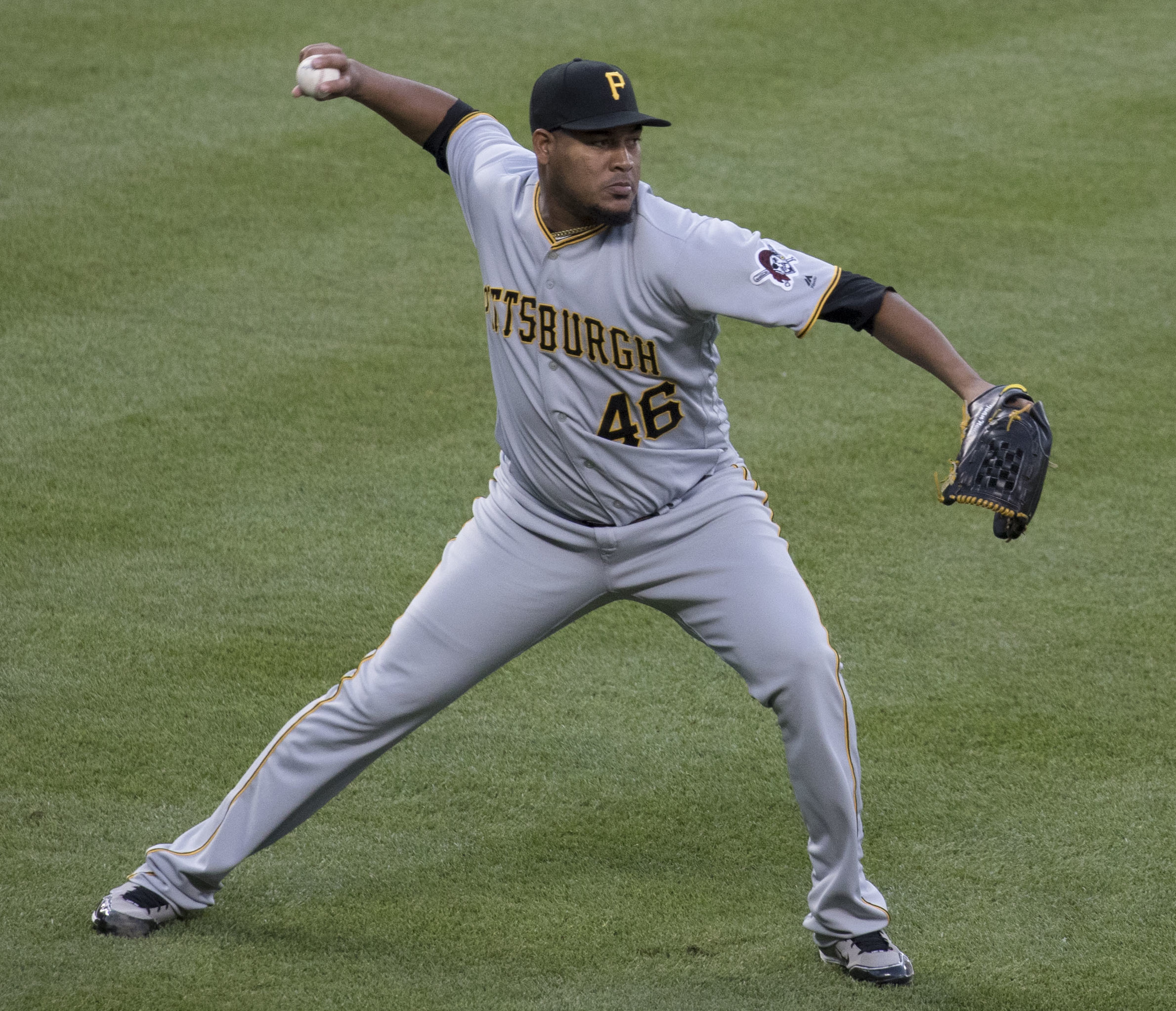 Pirates at Orioles 6/6/17